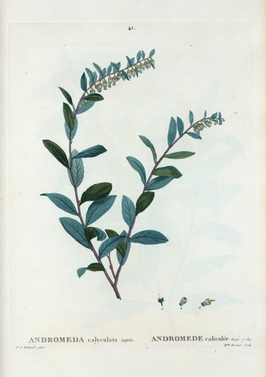 Andromeda calyculata = Andromede caliculéee.